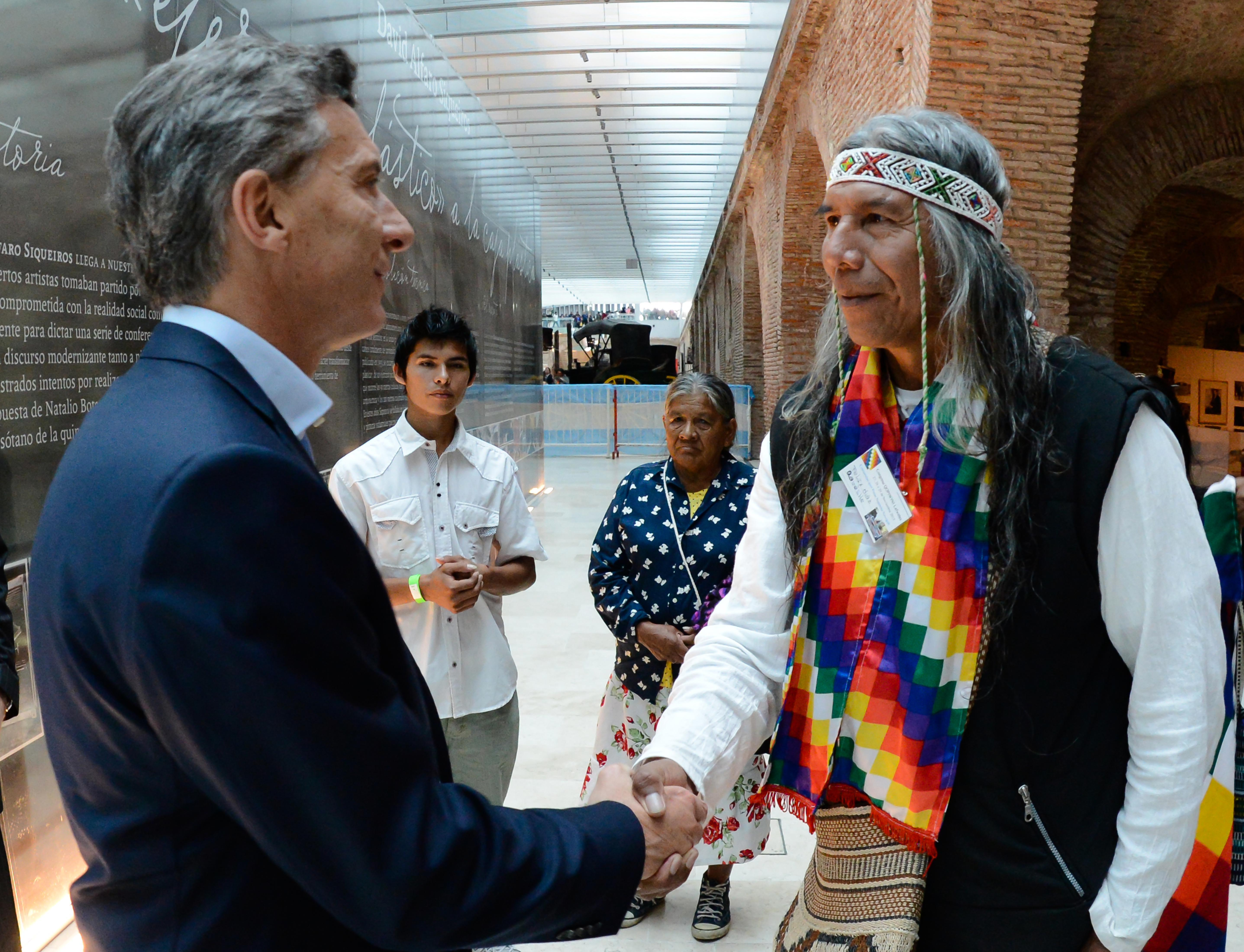 El presidente Mauricio Macri recibió a una delegación de un centenar de representantes de comunidades indígenas provenientes de 15 provincias, en el Museo del Bicentenario.